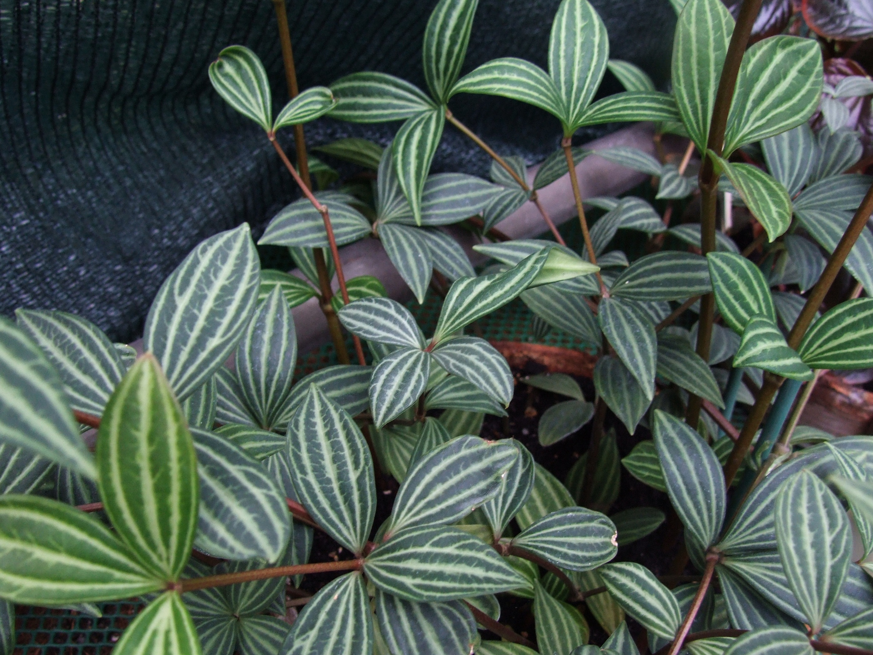 Peperomia tetragona (Peperomia puteolata)